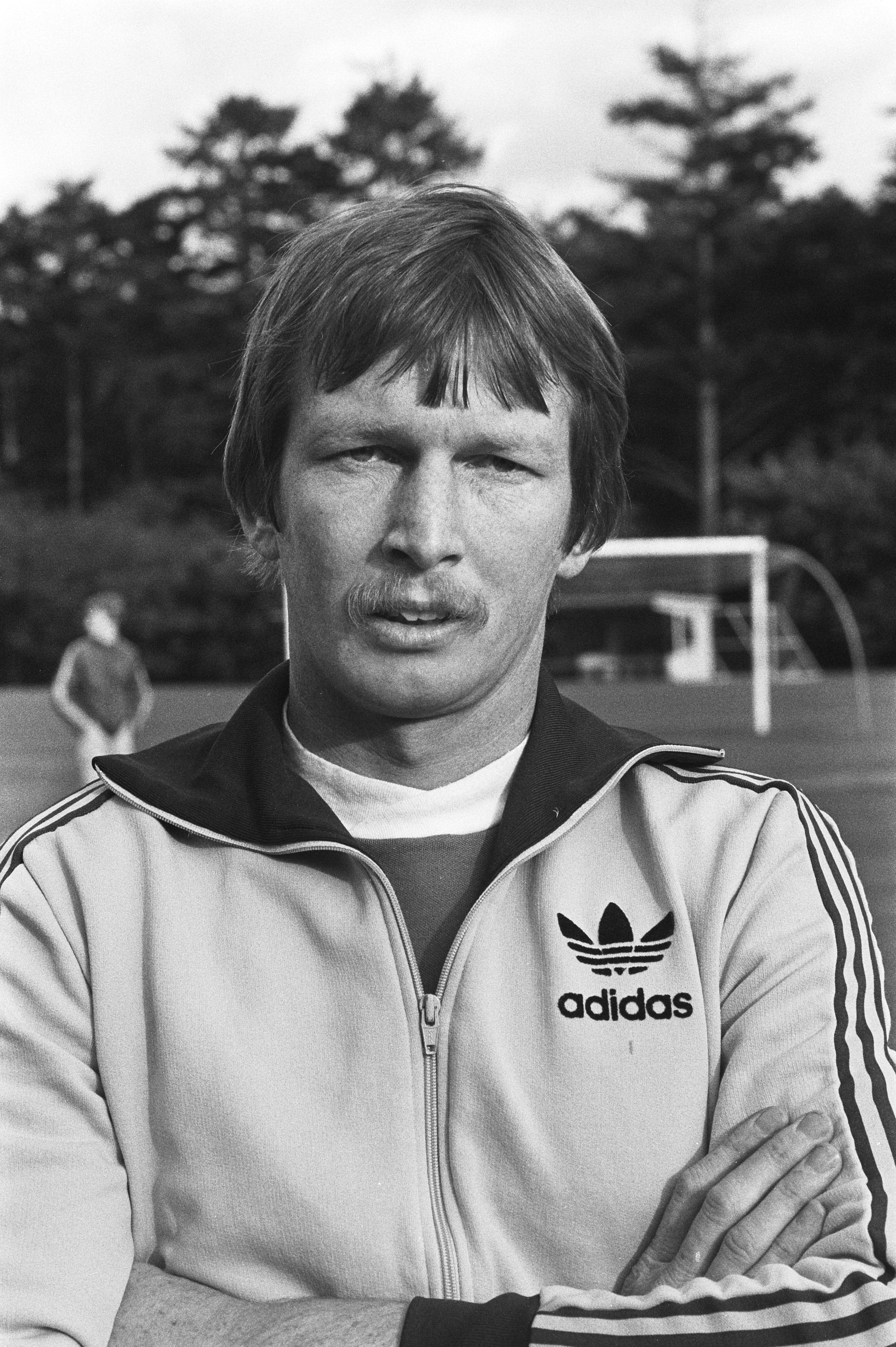 Collectie / Archief : Fotocollectie Anefo Reportage / Serie : [ onbekend ] Beschrijving : Nederlands elftal trainde vanmiddag in Zeist i.v.m. interland tegen West-Duitsland a.s. zaterdag, debutant Jos Jonker Datum : 9 oktober 1980 Locatie : B.R.D., Duitsland, Zeist Trefwoorden : debutanten, elftallen, sport, voetbal Persoonsnaam : Jos Jonker Fotograaf : Pereira, Fernando / Anefo Auteursrechthebbende : Nationaal Archief Materiaalsoort : Negatief (zwart/wit) Nummer archiefinventaris : bekijk toegang 2.24.01.05 Bestanddeelnummer : 931-0736